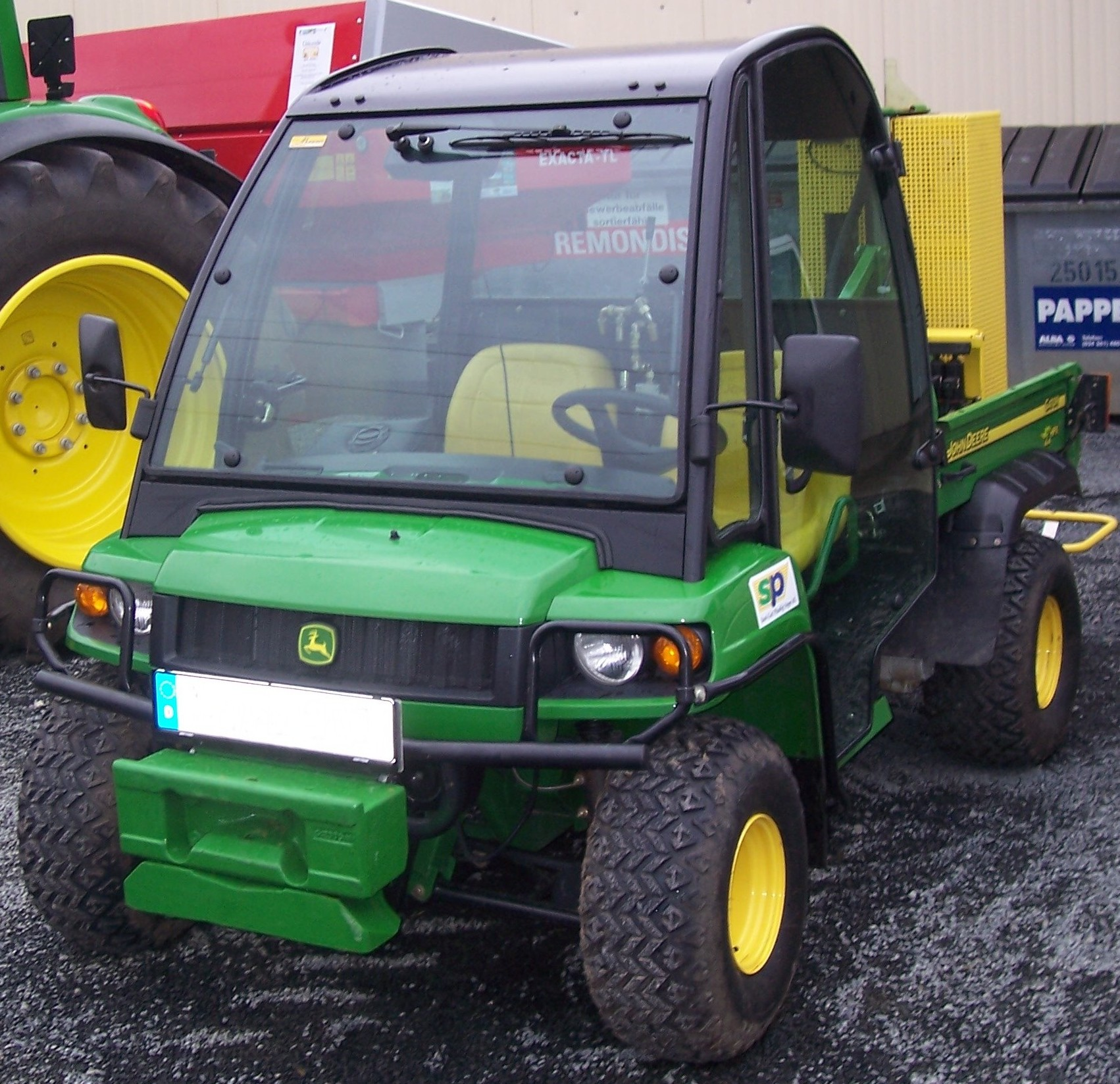 John Deere Gator HPX